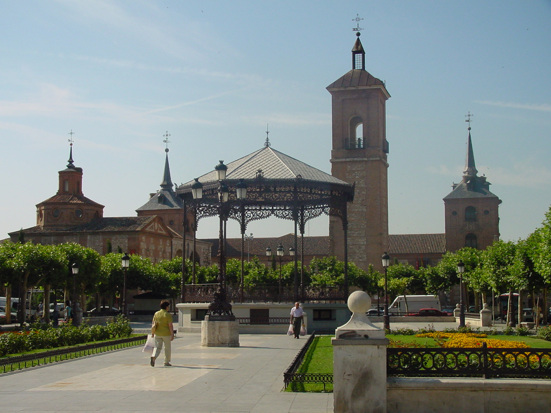 Plaza de Cervantes en Alcalá de Henares.